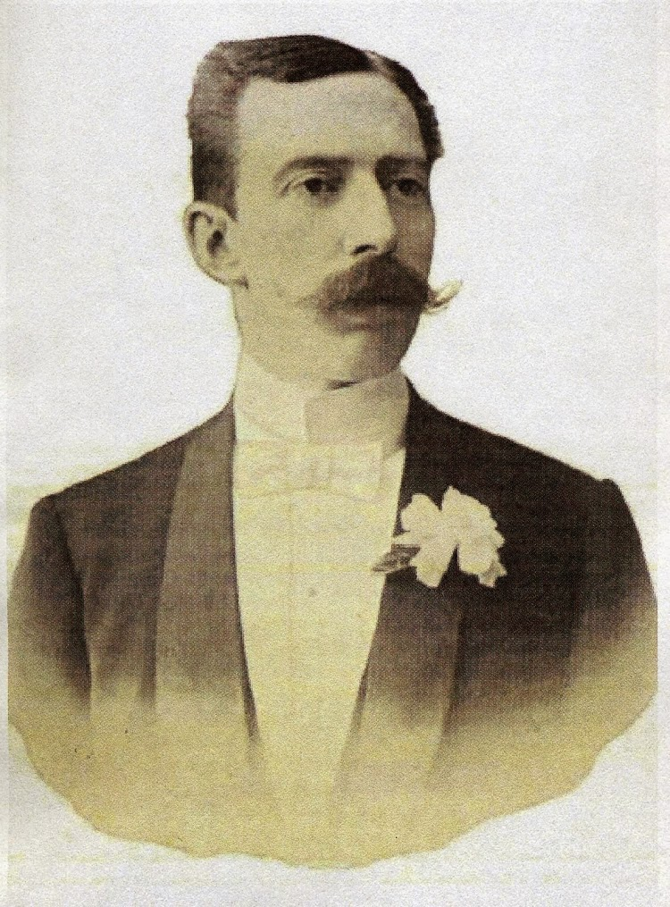 Joaquin Jover y Costas. Primer Marques de Gelida. LA ILUSTRACION ESPAÑOLA Y AMERICANA. 8 de Septiembre de 1896